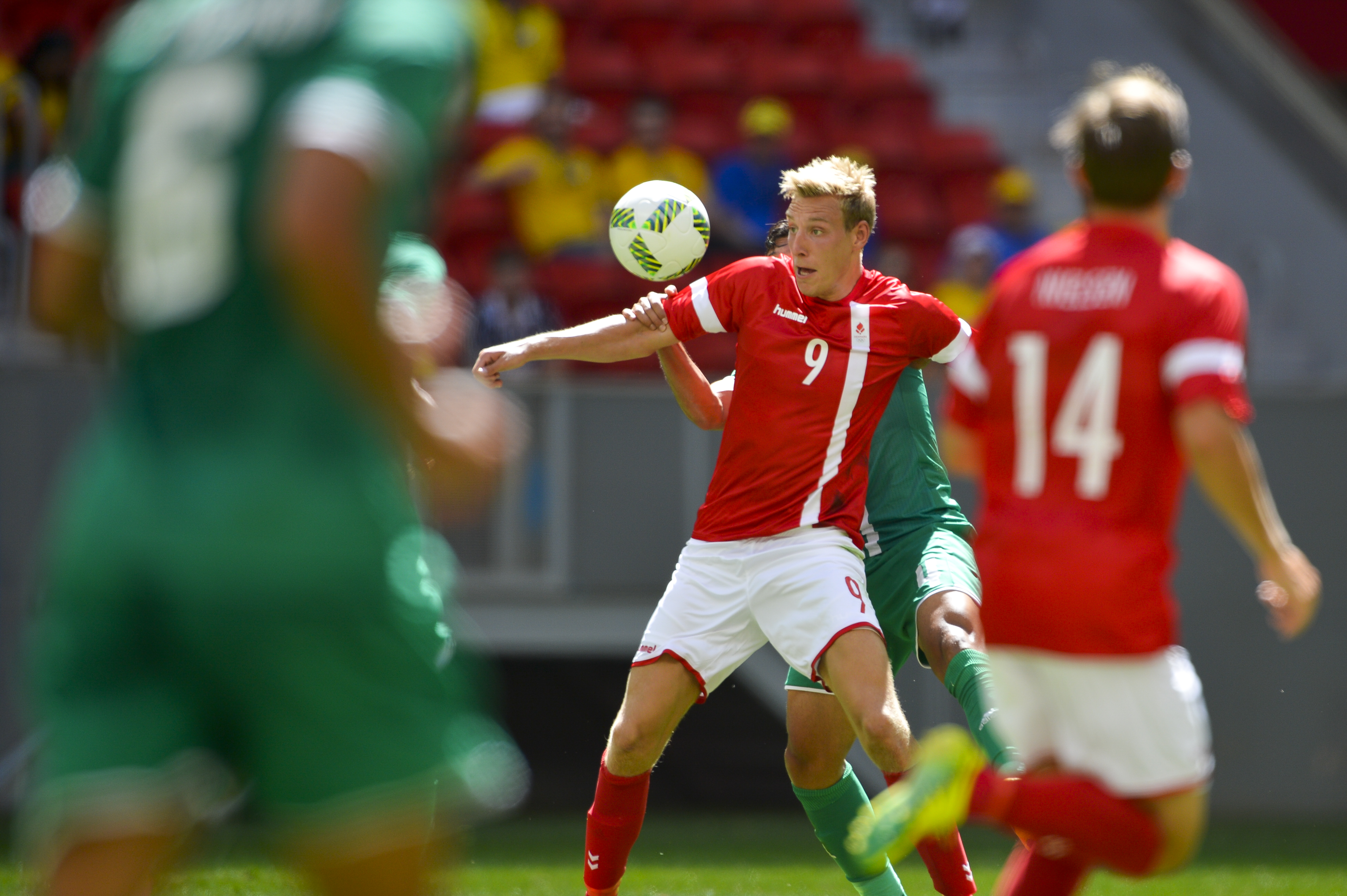 Brasília - A seleção do Iraque enfrenta a seleção da Dinamarca pela primeira fase do futebol olímpico, no estádio Mané Garrincha ( Marcelo Camargo/Agência Brasil)